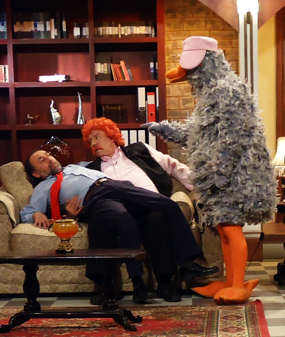 El Profesor Rossa (Iván Arenas), Don Carter (Juan Alcayaga) y Guru-Guru (Claudio Moreno) durante un capitulo de "La Mansión Rossa"